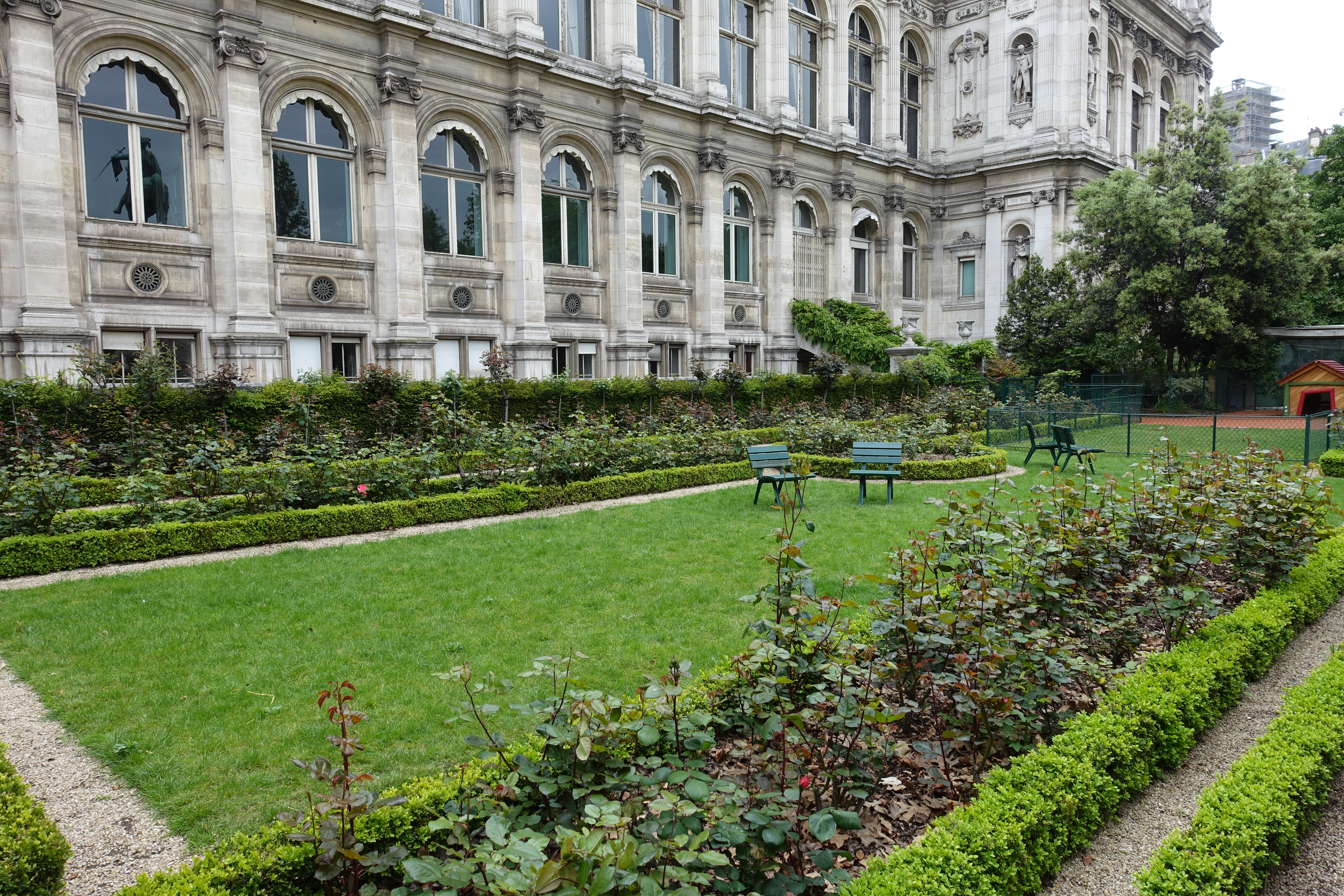 Jardin des Combattants Espagnols de la Nueve @ City Hall @ Paris